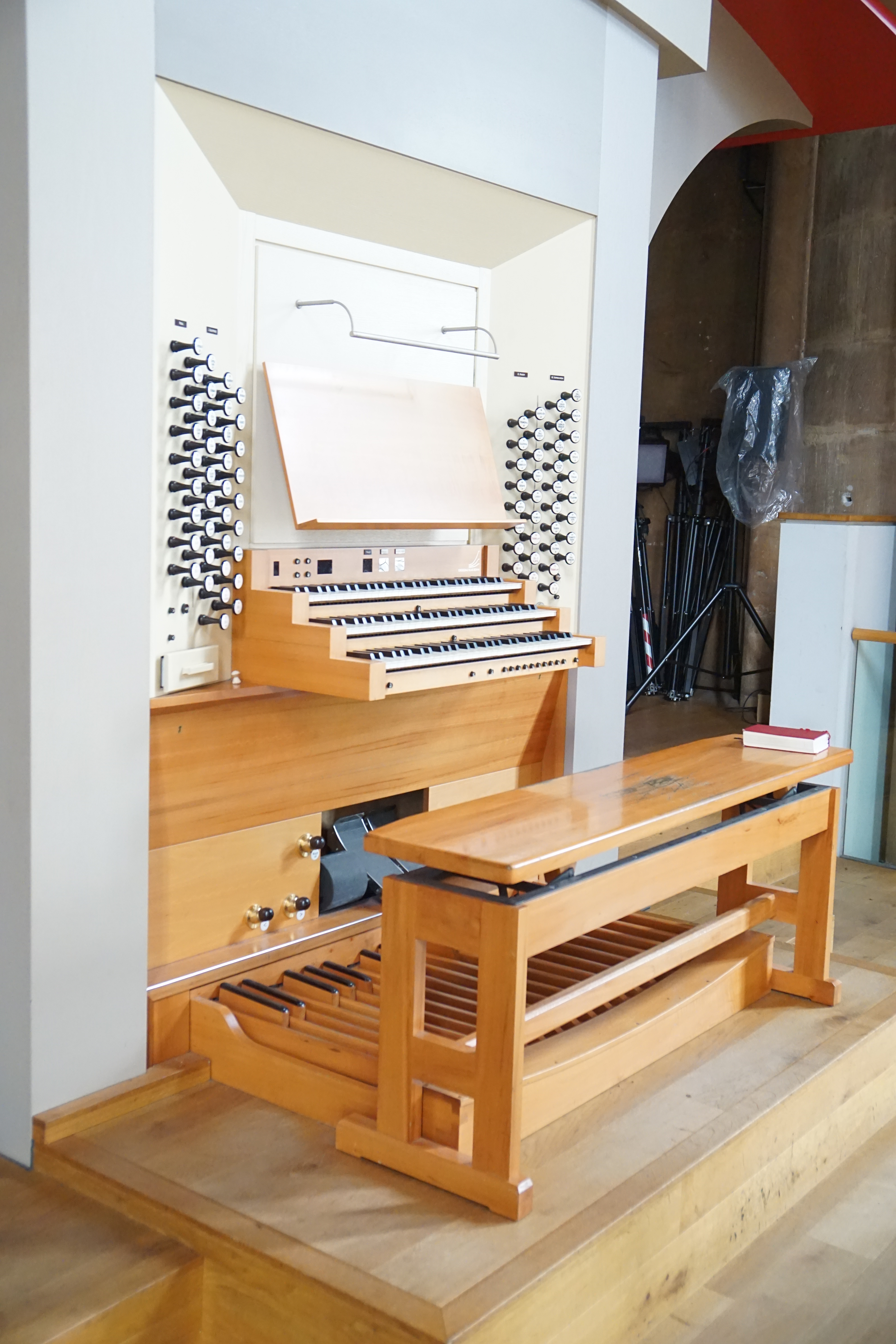 Siehe Dateiname